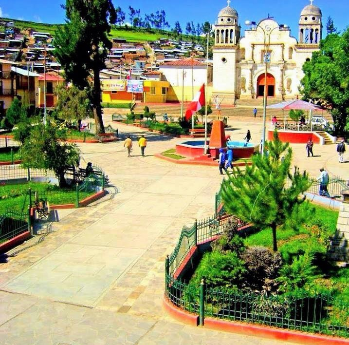 Hermosa ciudad de cora cora